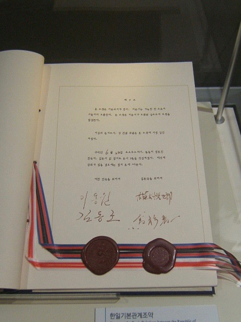 대한민국역사박물관에 전시된 한일기본조약 사본